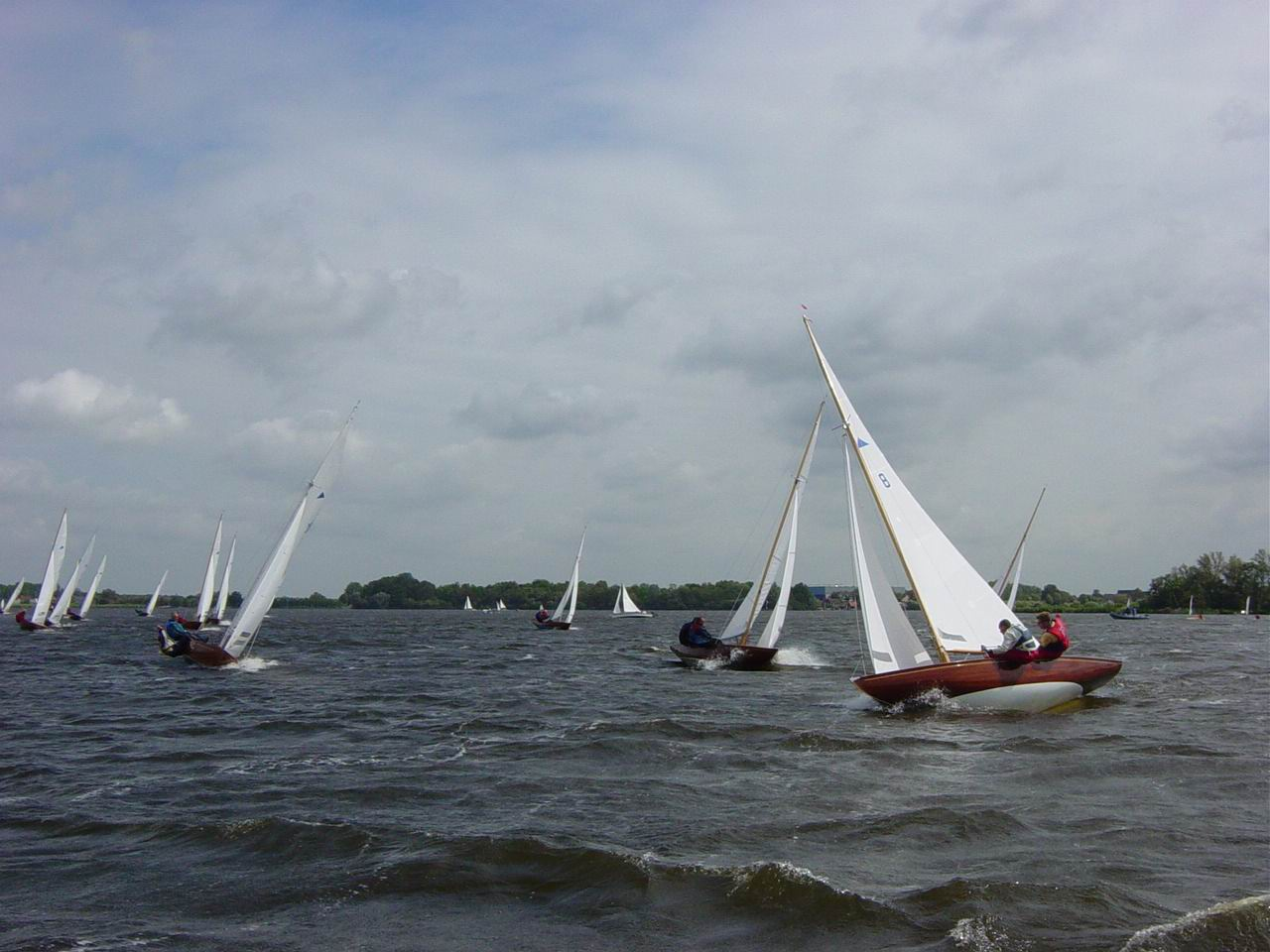 Pampussen_tijdens_de_Kaagweek_in_2004